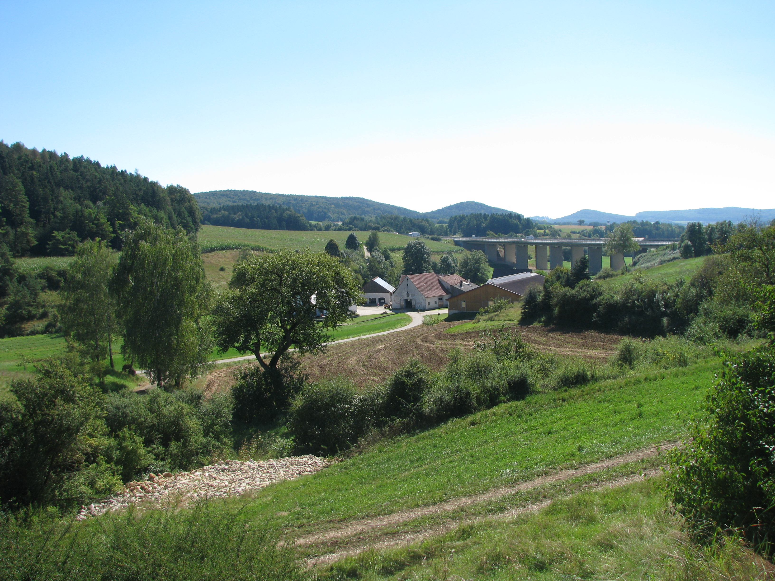 Schallermühle, Ortsteil von Velburg im Landkreis Neumarkt i. d. Opf.